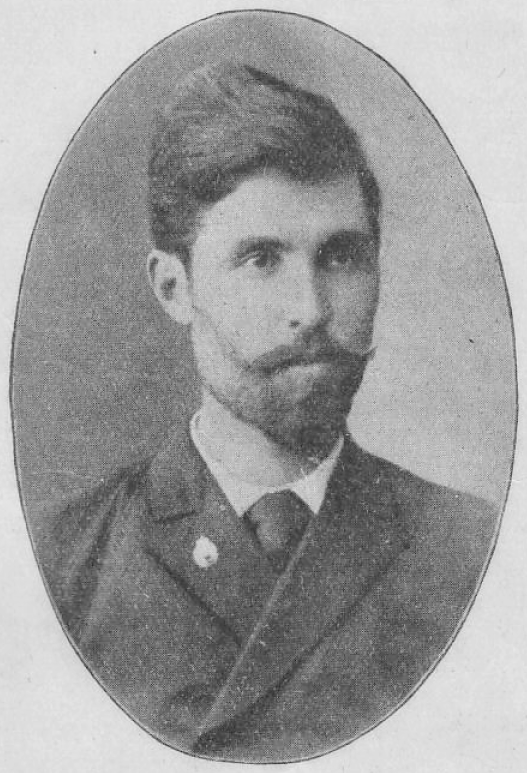 Иван Проханов в молодости